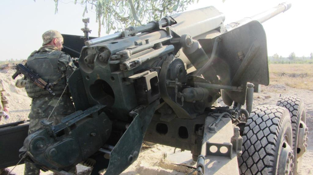 2А36 «Гіацинт-Б». Артилеристи 44-ї окремої артилерійської бригади ОК «Захід» відпрацьовують нормативи спеціальної, технічної підготовки та виконання вправ стрільб зі штатного озброєння.